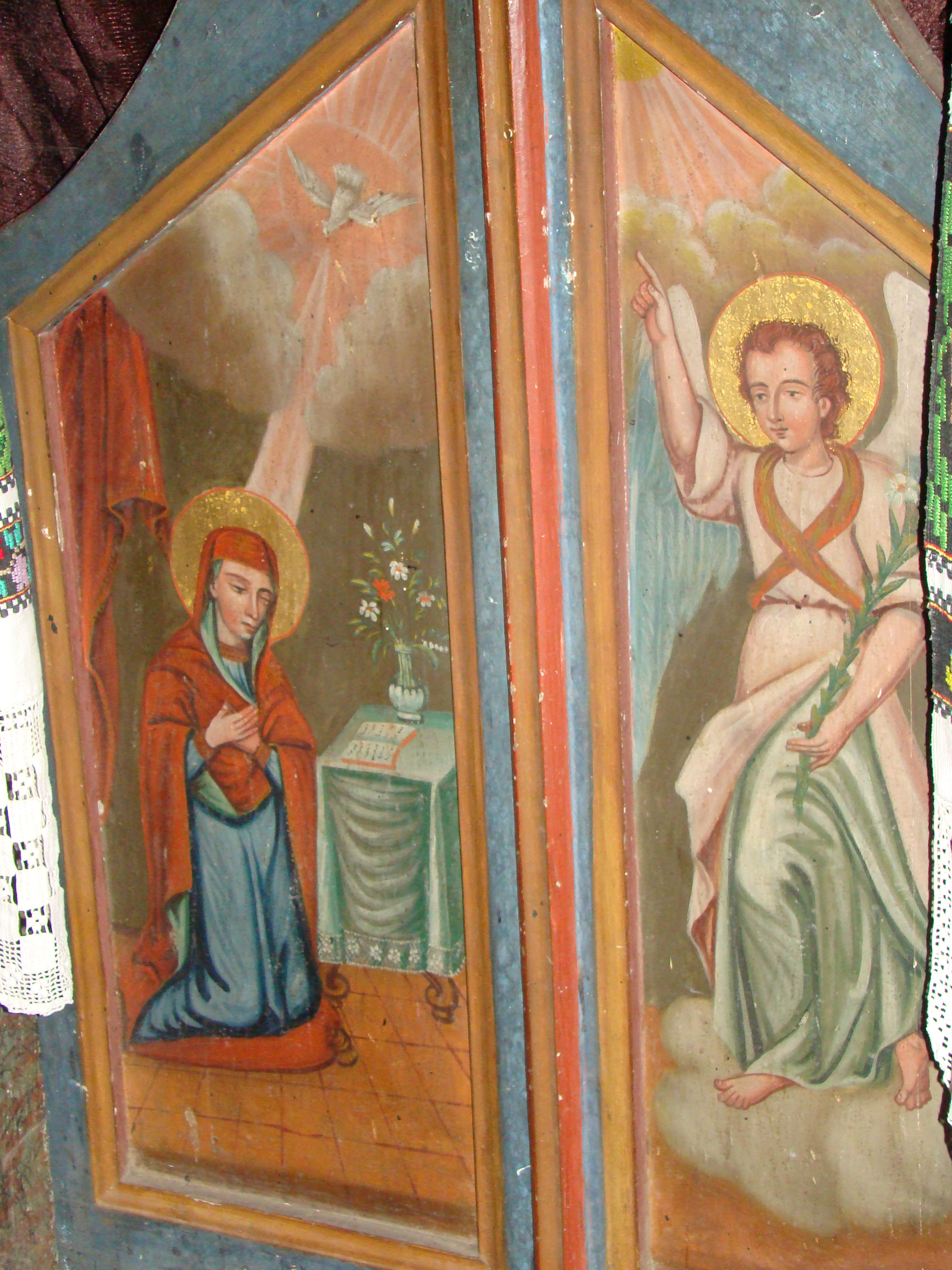 Biserica de lemn „Sf.Nicolae” din Căraci-Hunedoara